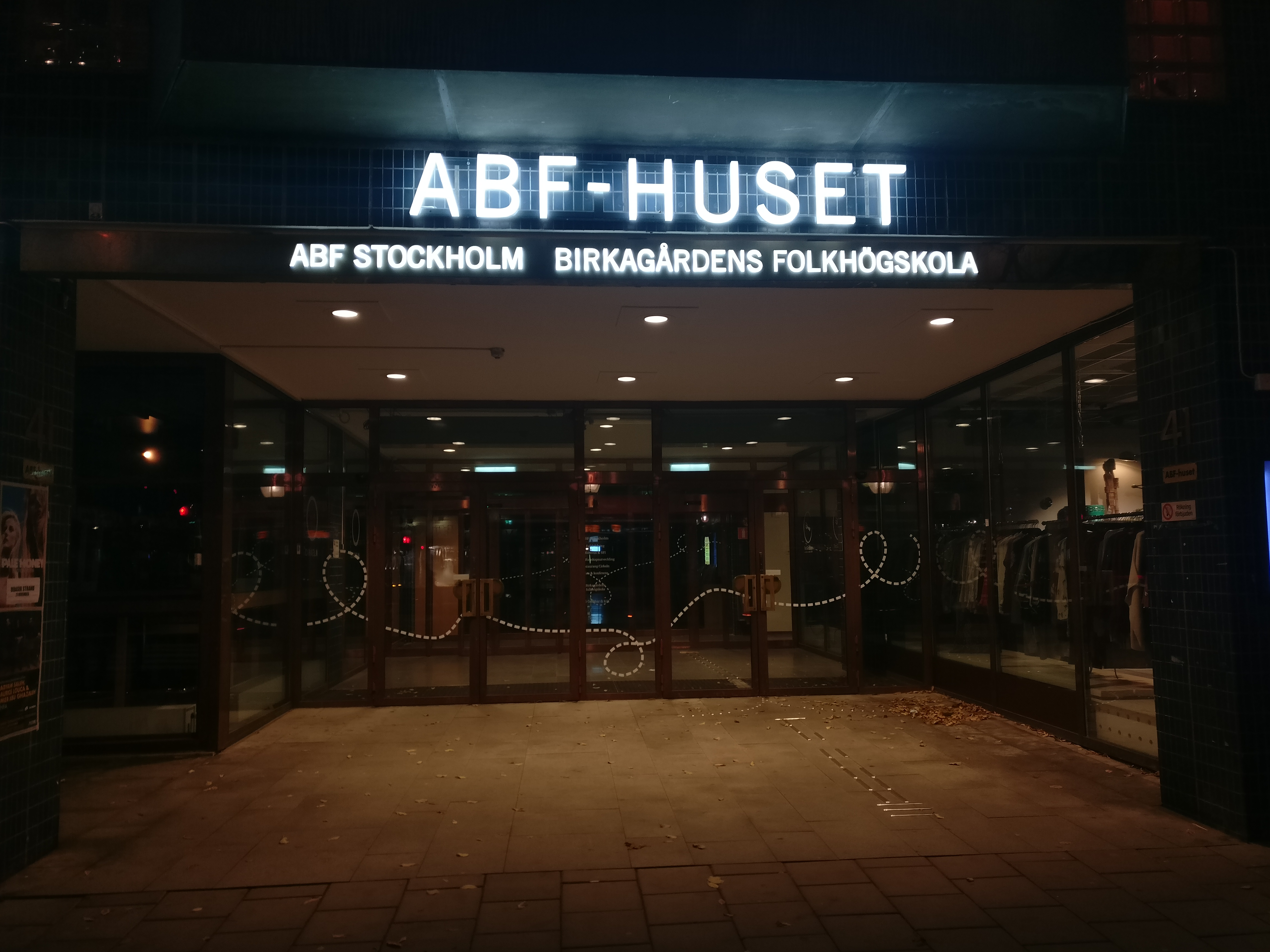 Birkagårdens folkhögskola